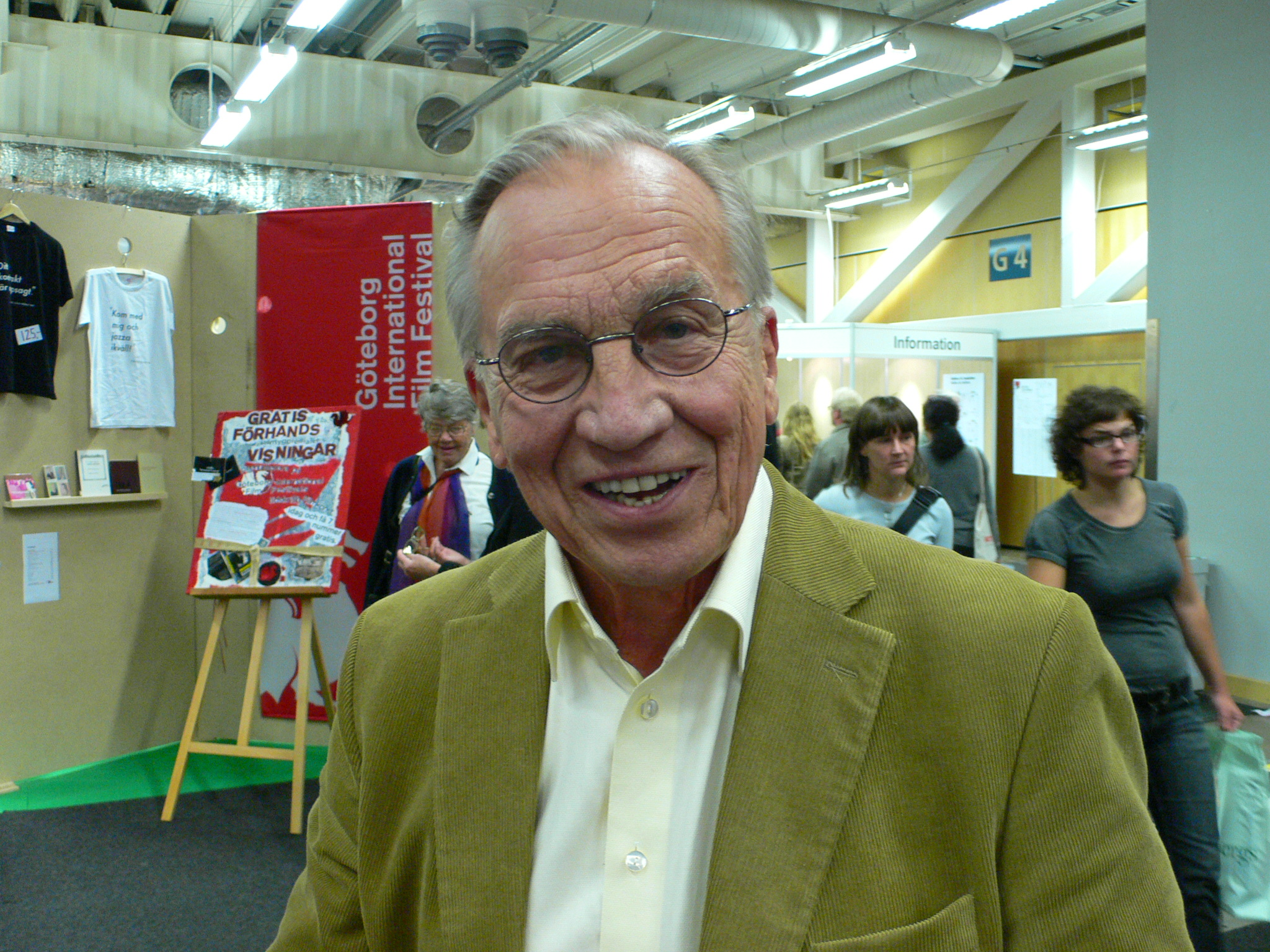 Åke Ortmark at Gothenburg Bookfair 2007, Åke Ortmark på Göteborgs bok- och biblioteksmässa 2007